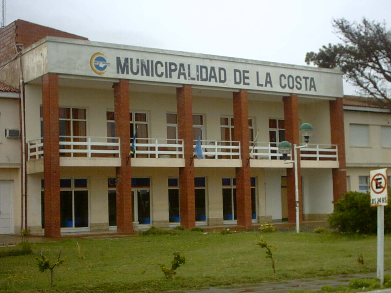 Edificio Municipalidad de la Costa